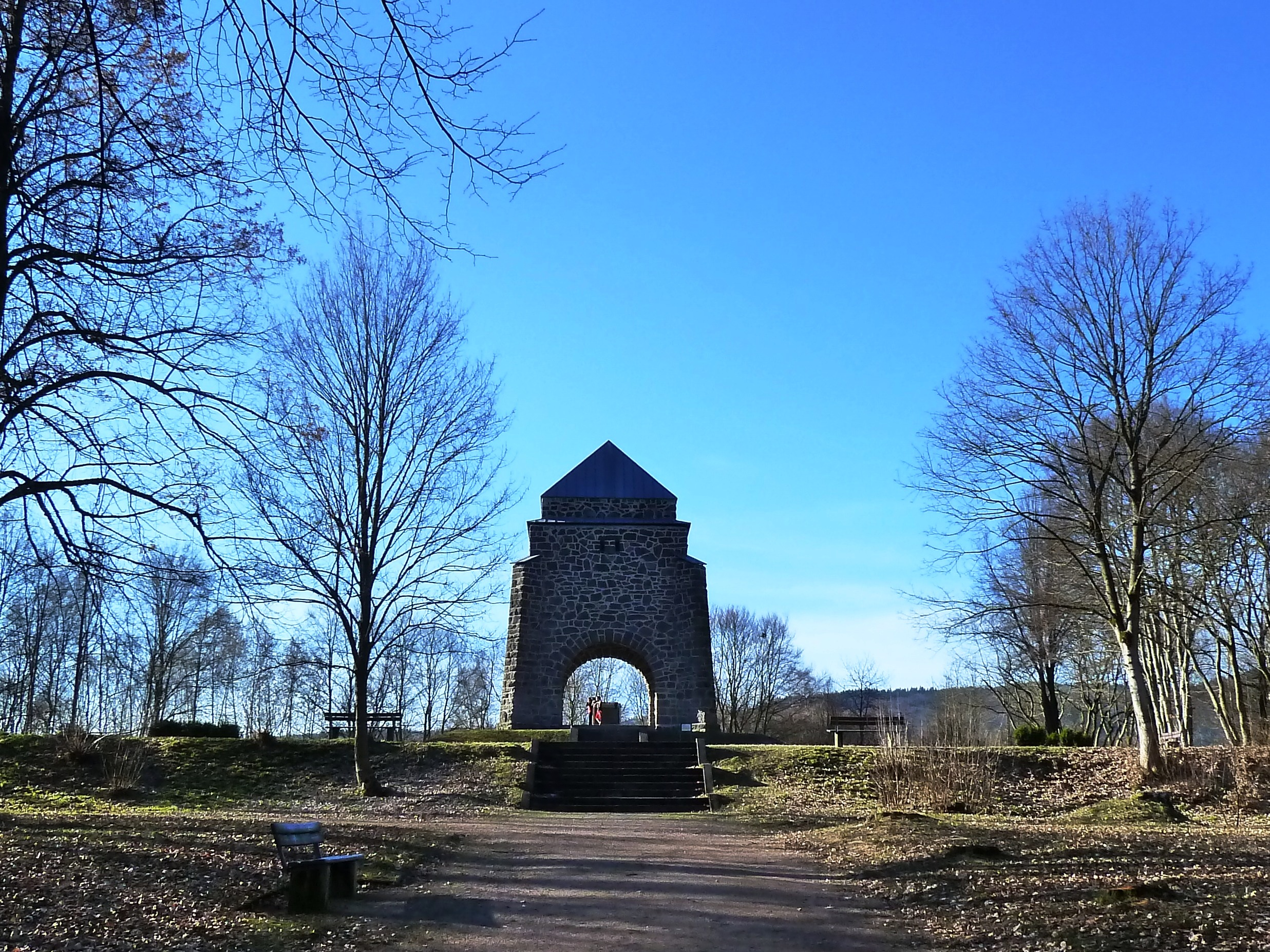 Kriegerdenkmal Zella-Mehlis Frühjahr 2014, Blick vom Hauptweg